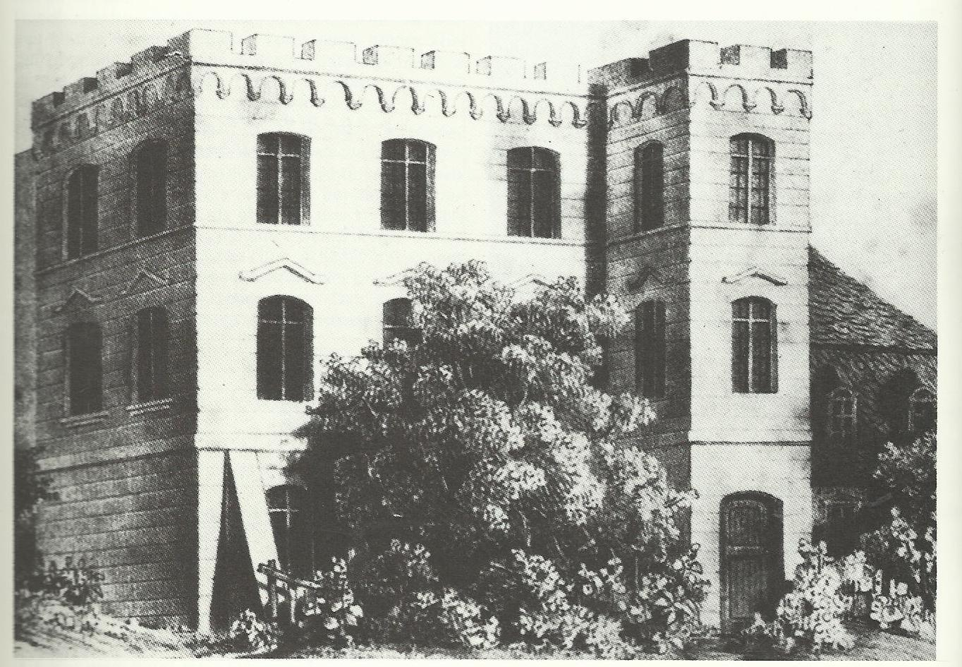 Villa Schaaffhausen, rechts das 1856 abgerissene „Wasserfall'sche Haus“